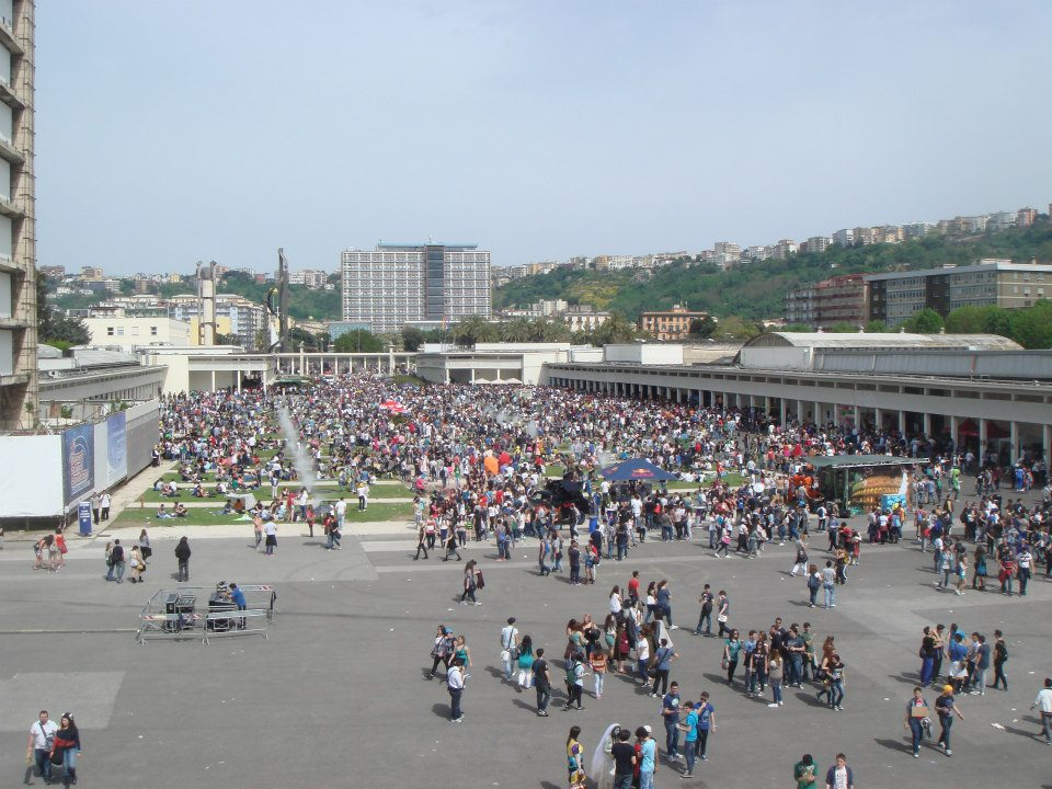 autore: Salvatore Architravo / ARCHIsavio.